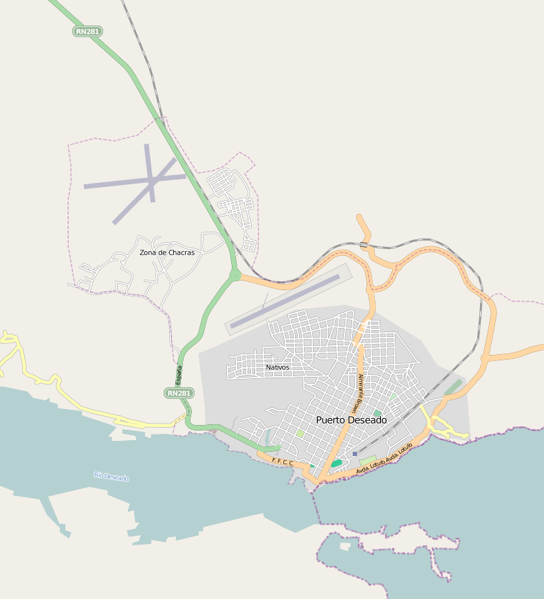 Mapa de Puerto Deseadoo